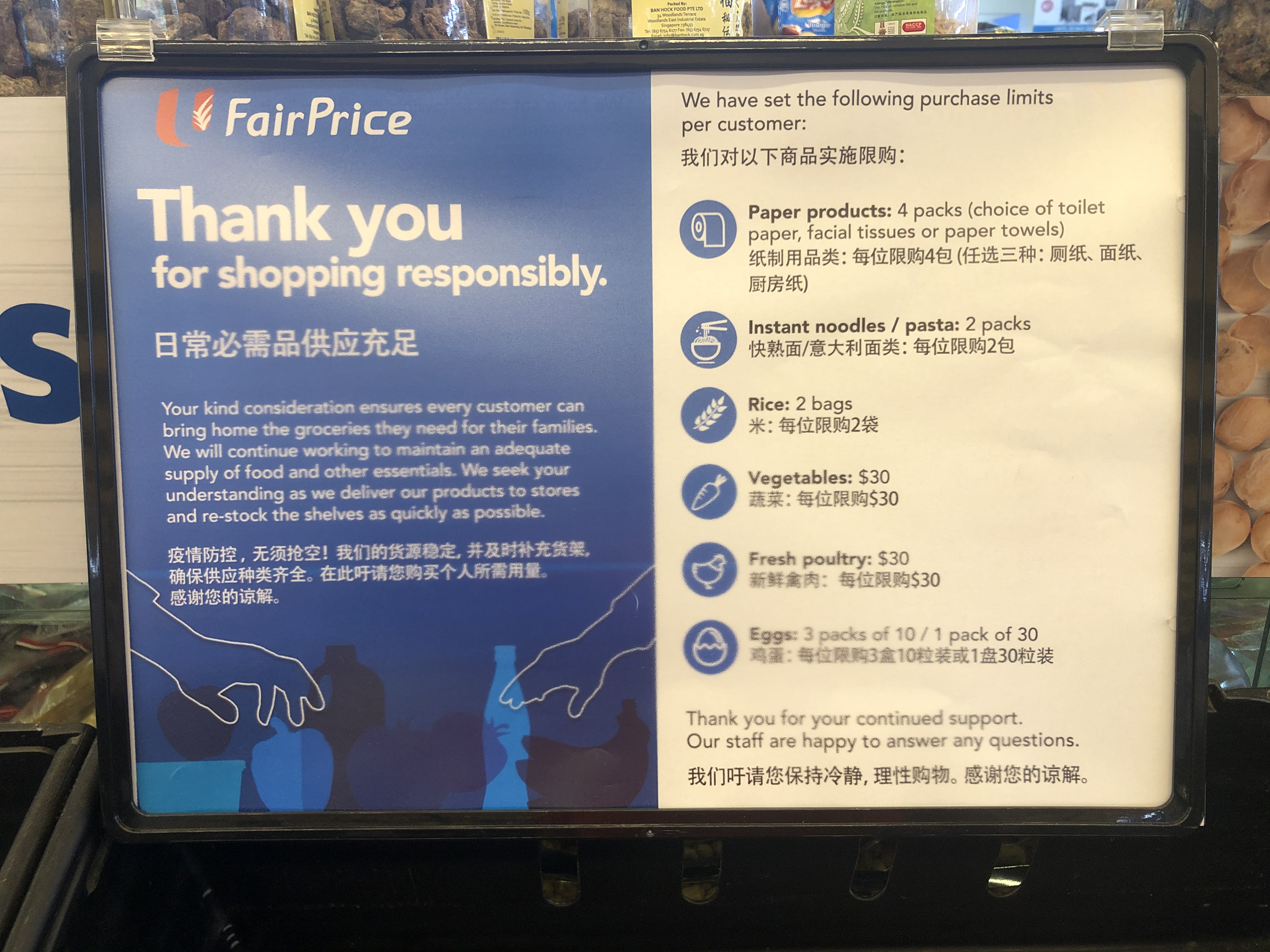 2020年3月18日，前日马来西亚宣布锁国後新加坡超市实行限购政策